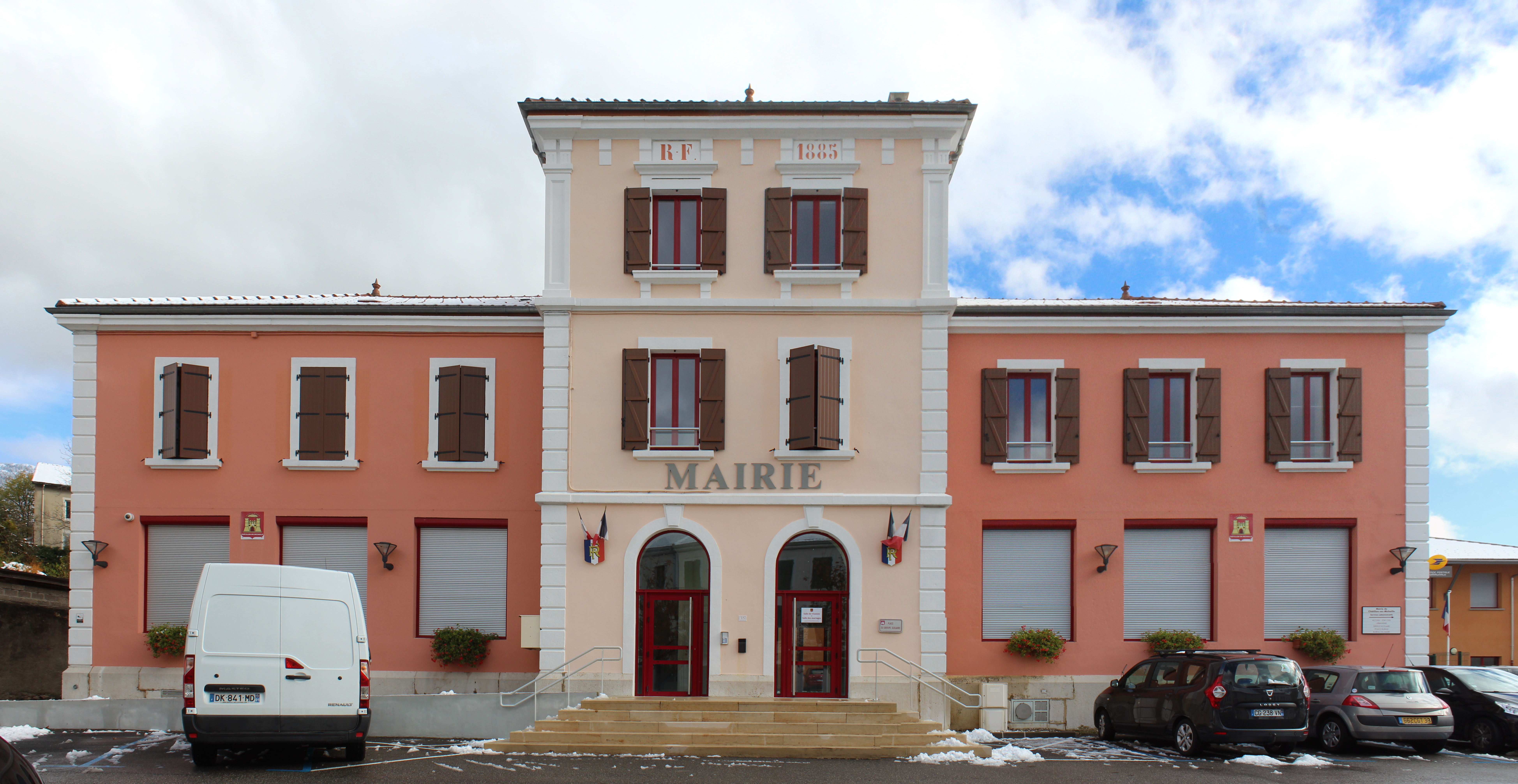 Ancienne mairie de Châtillon-en-Michaille, Valserhône.